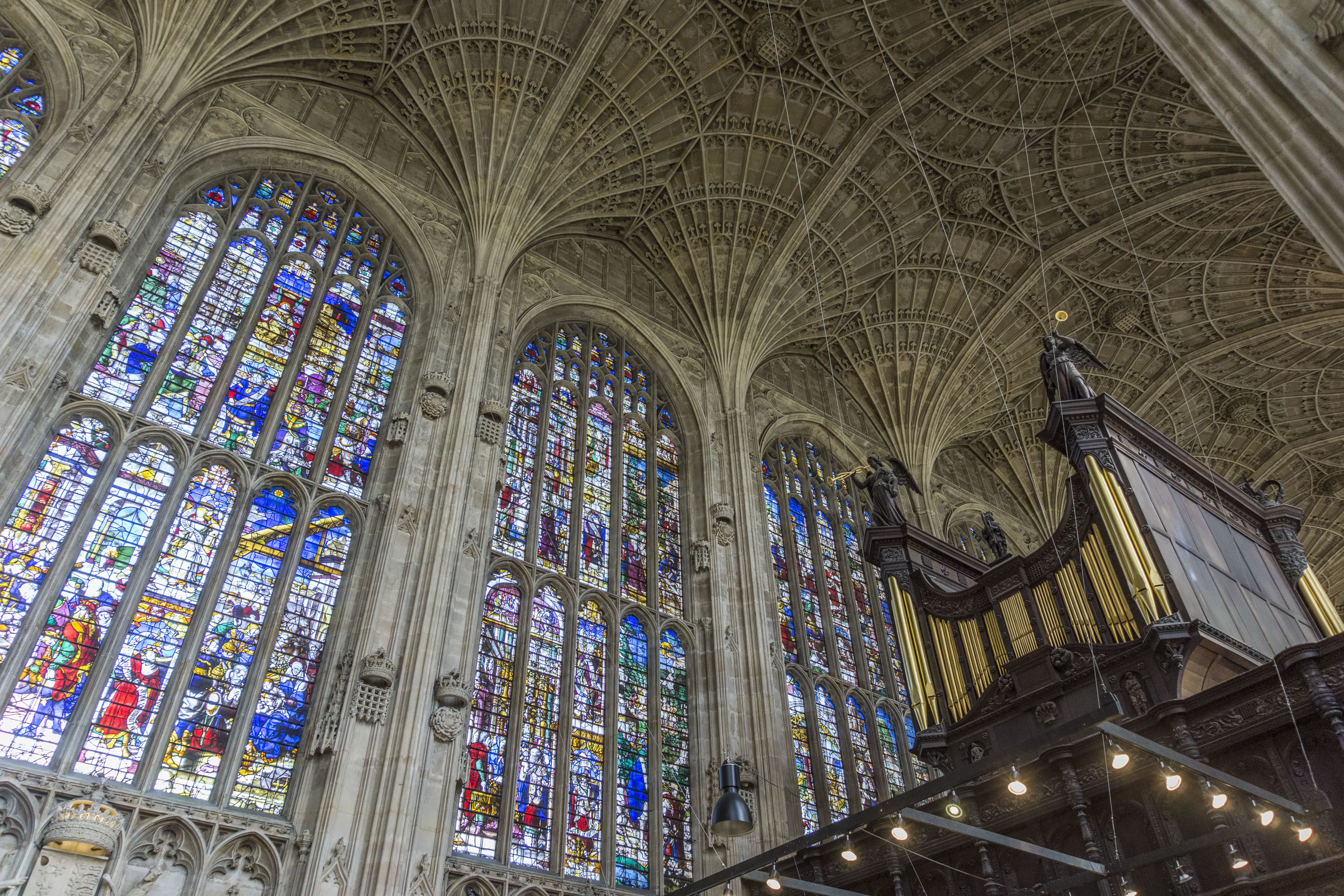 Intérieur de la King's College Chapel, avec vue sur le plafond en éventail